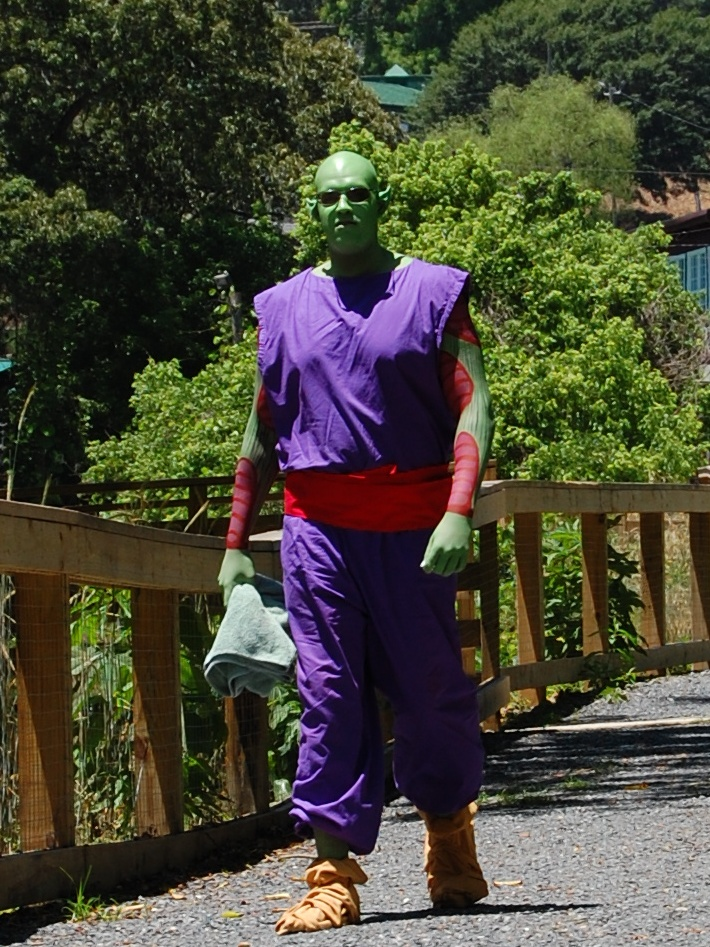 cosplay de Piccolo/Picoro de la serie Dragon ball Z con lentes